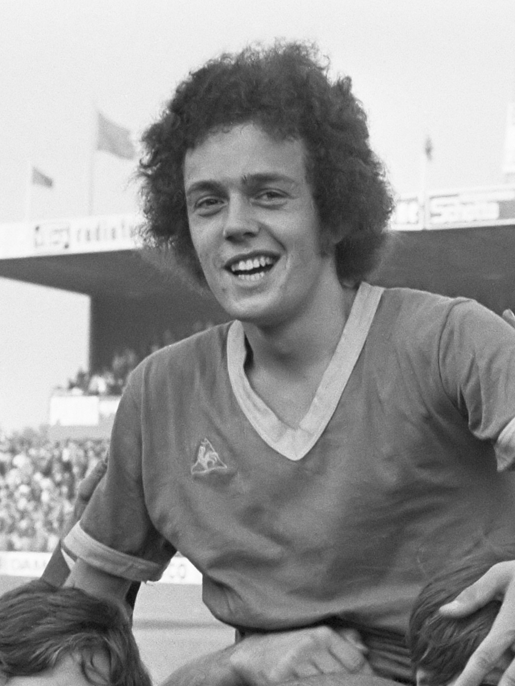 FC Den Haag tegen Feyenoord 3-2, Hans Bres op de schouders 8 oktober 1972